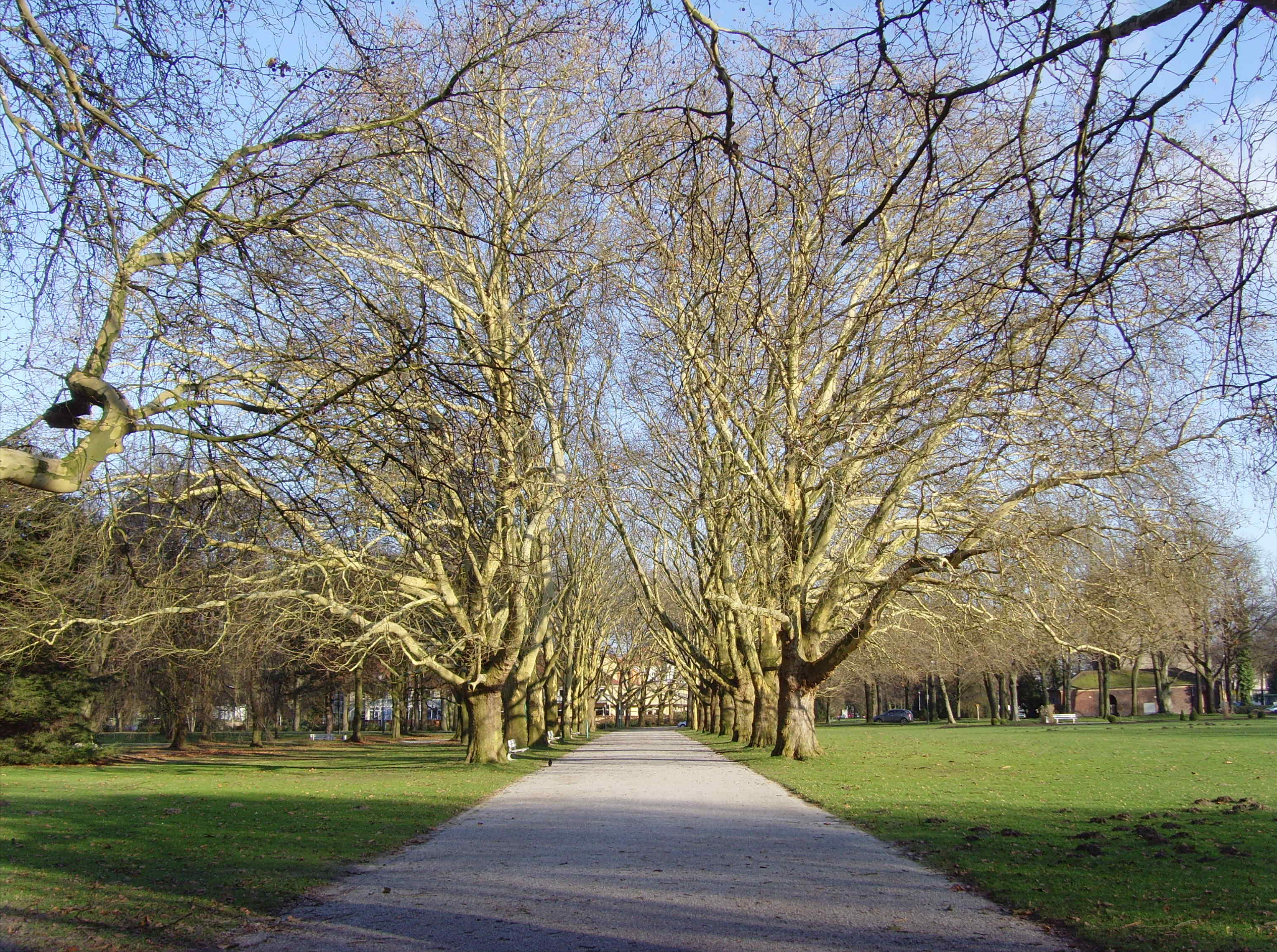 Platanenallee im Kurpark in Hamm